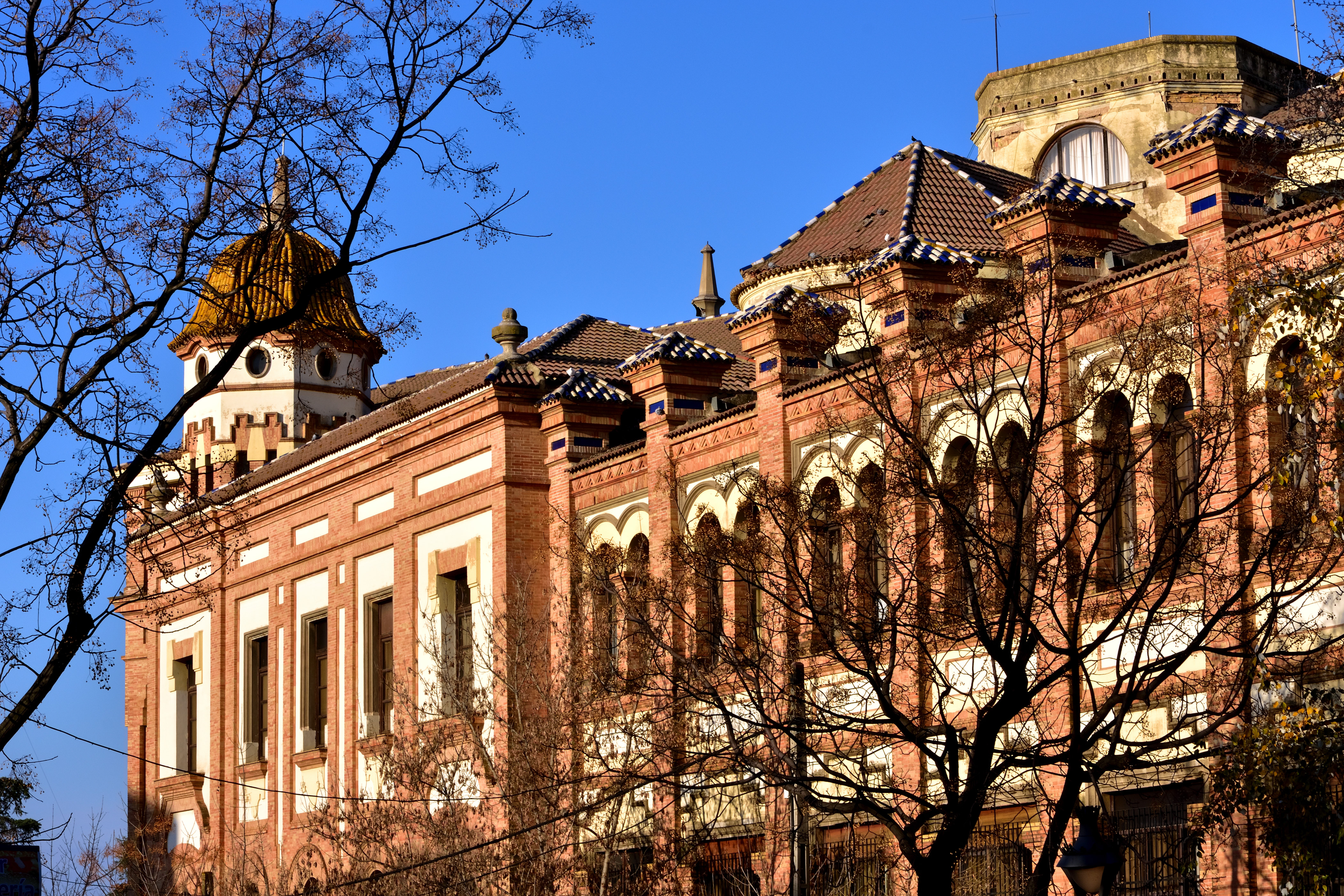 IES La Rábida, fachada oriental.